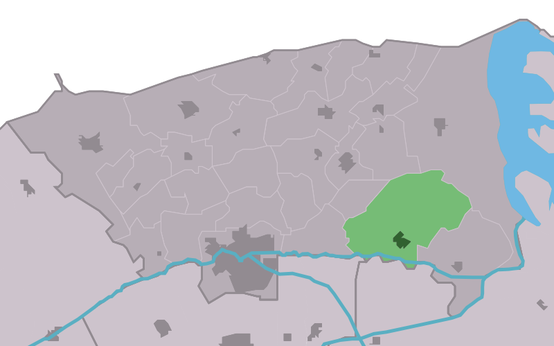 Kaartsje fan himrik fan Ie